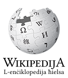 Wikipedia logo 2.0 (uk)